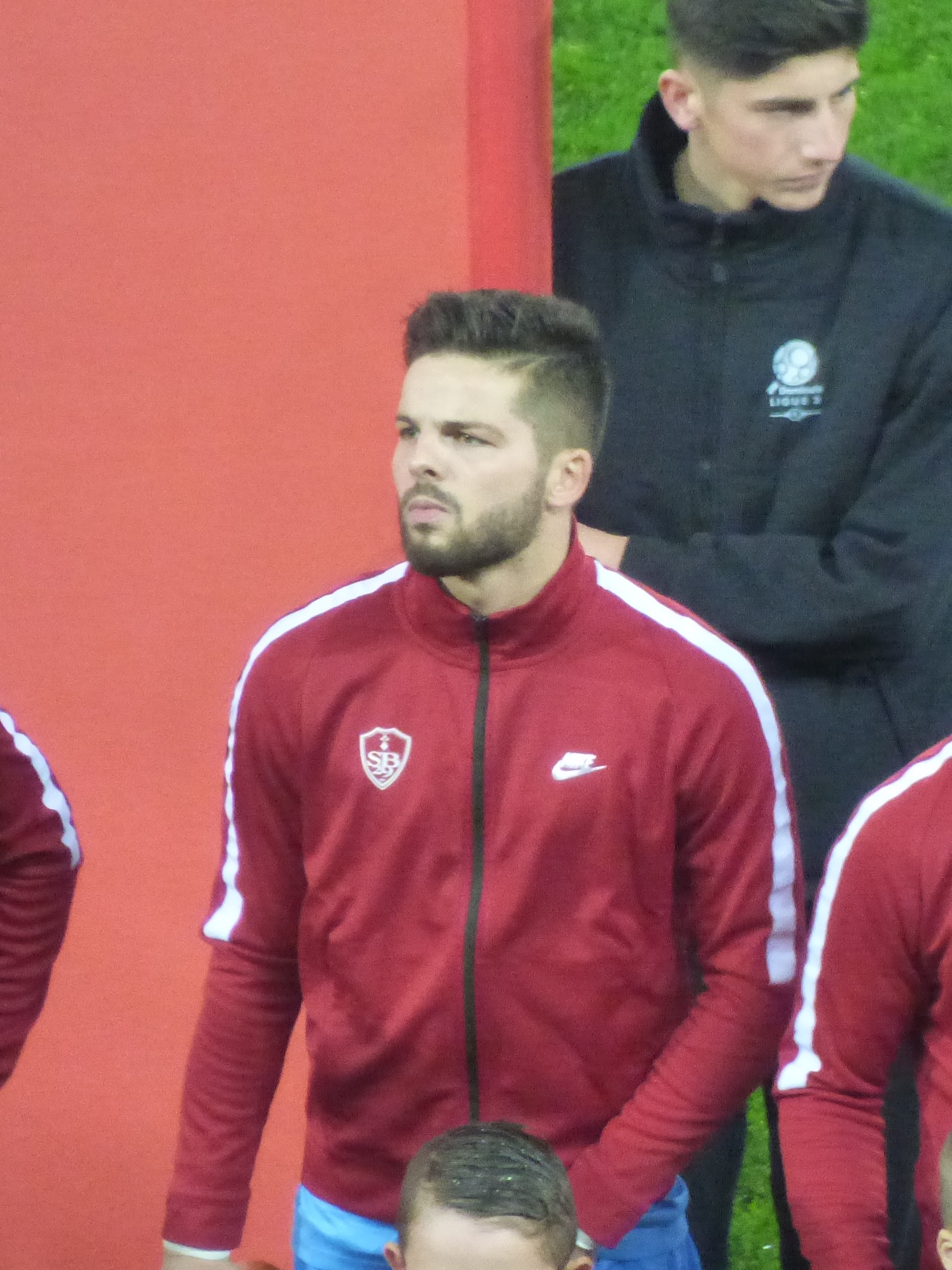 Gautier Larsonneur avant le match RC Lens / Stade brestois, le 4 décembre 2018, comptant pour la dix-septième journée du championnat de France de football de Ligue 2 2018-2019, au Stade Bollaert-Delelis.